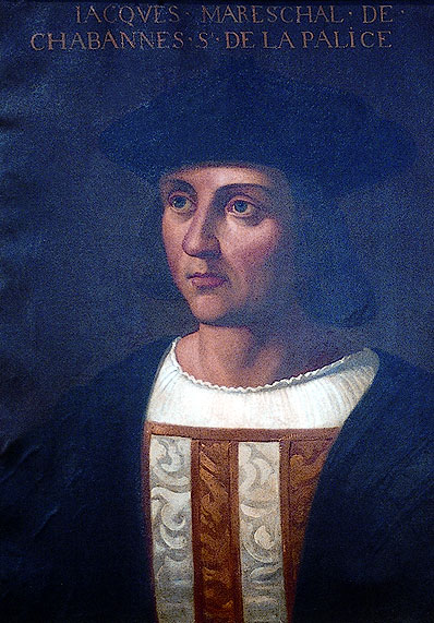 Portrait de Jacques II de Chabannes seigneur de La Palice, collection du château de Beauregard.